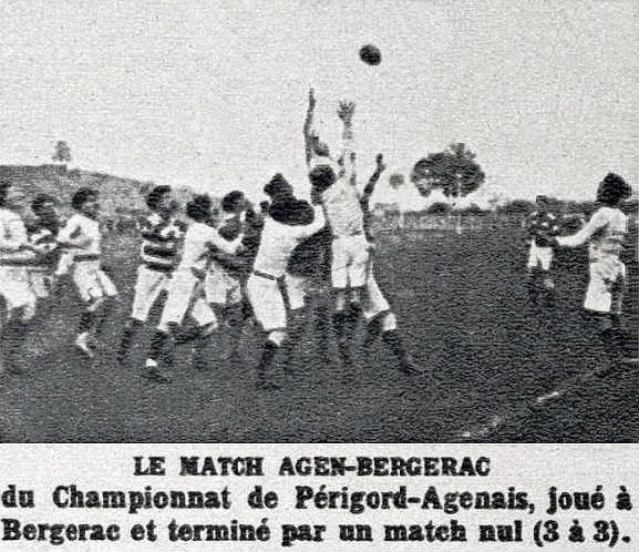 Le match de rugby Bergerac (rayés) - Agen (blancs), en novembre 1921 (rugby à XV - 3-3).